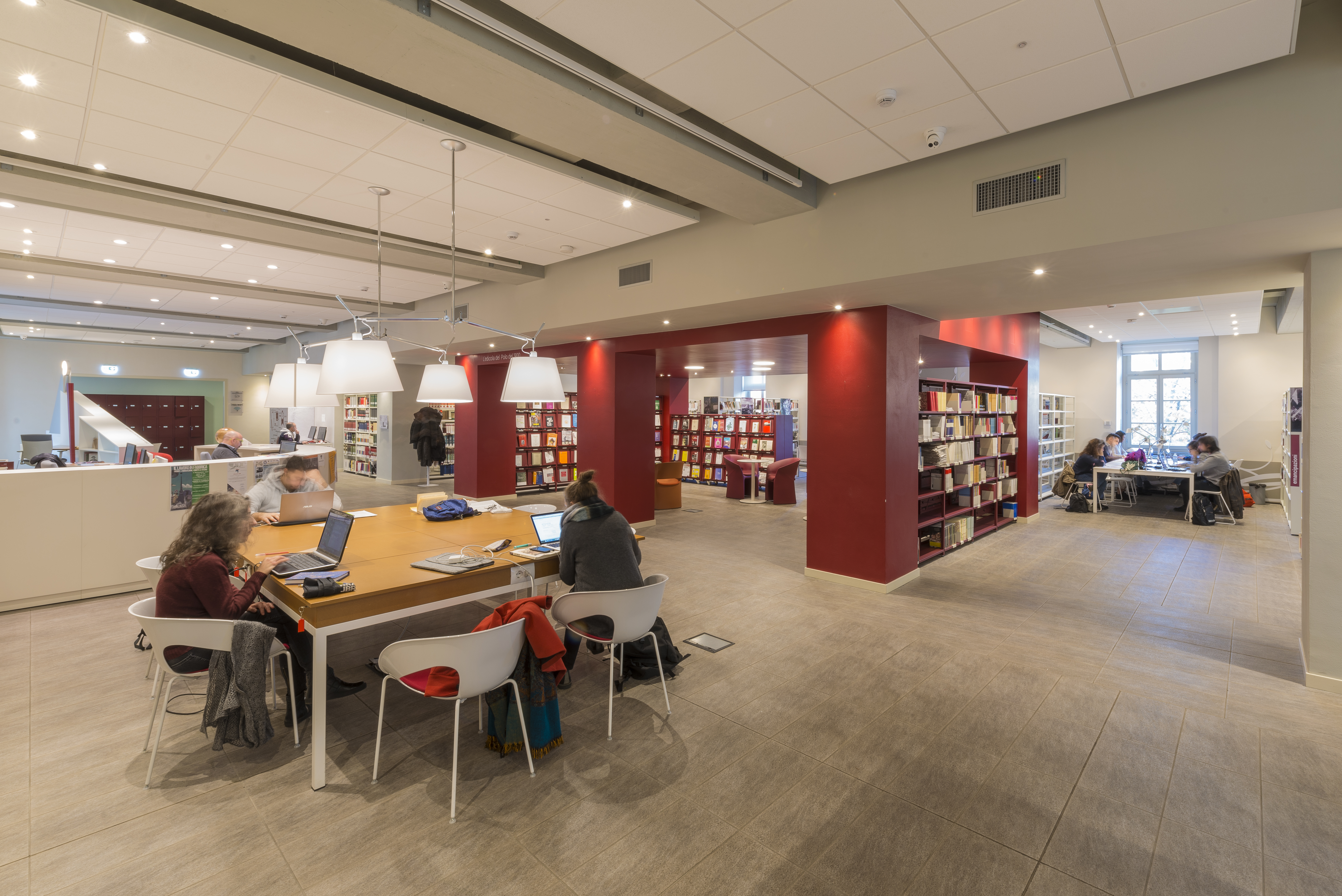 Sala Lettura al primo piano di Palazzo San Daniele